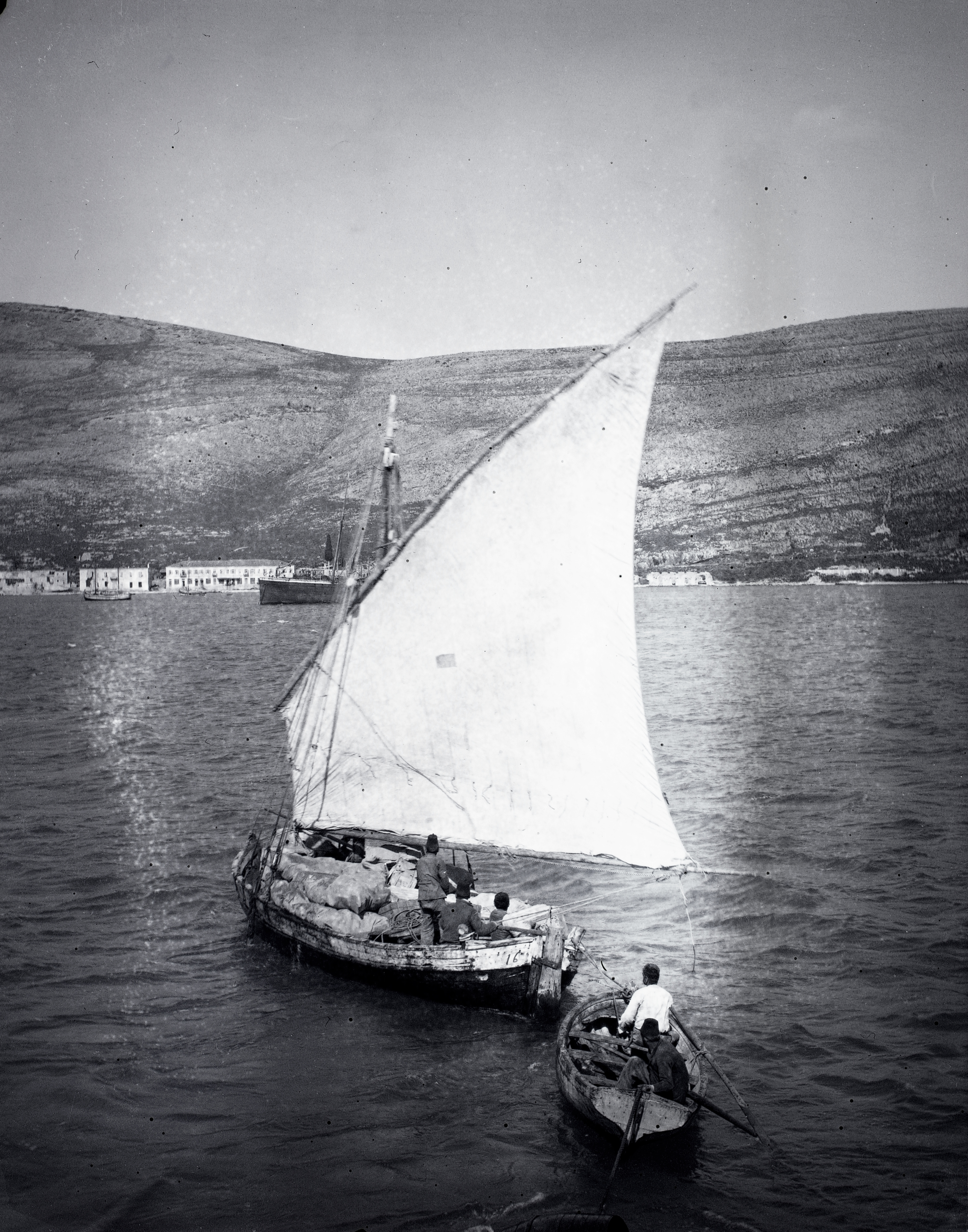 kikötő a tenger felől nézve. Location: Albania Tags: sailboat, boat Title: kikötő a tenger felől nézve.